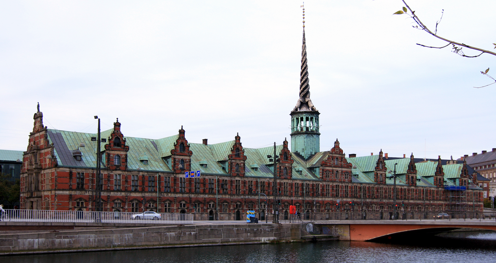 Børsen, København.